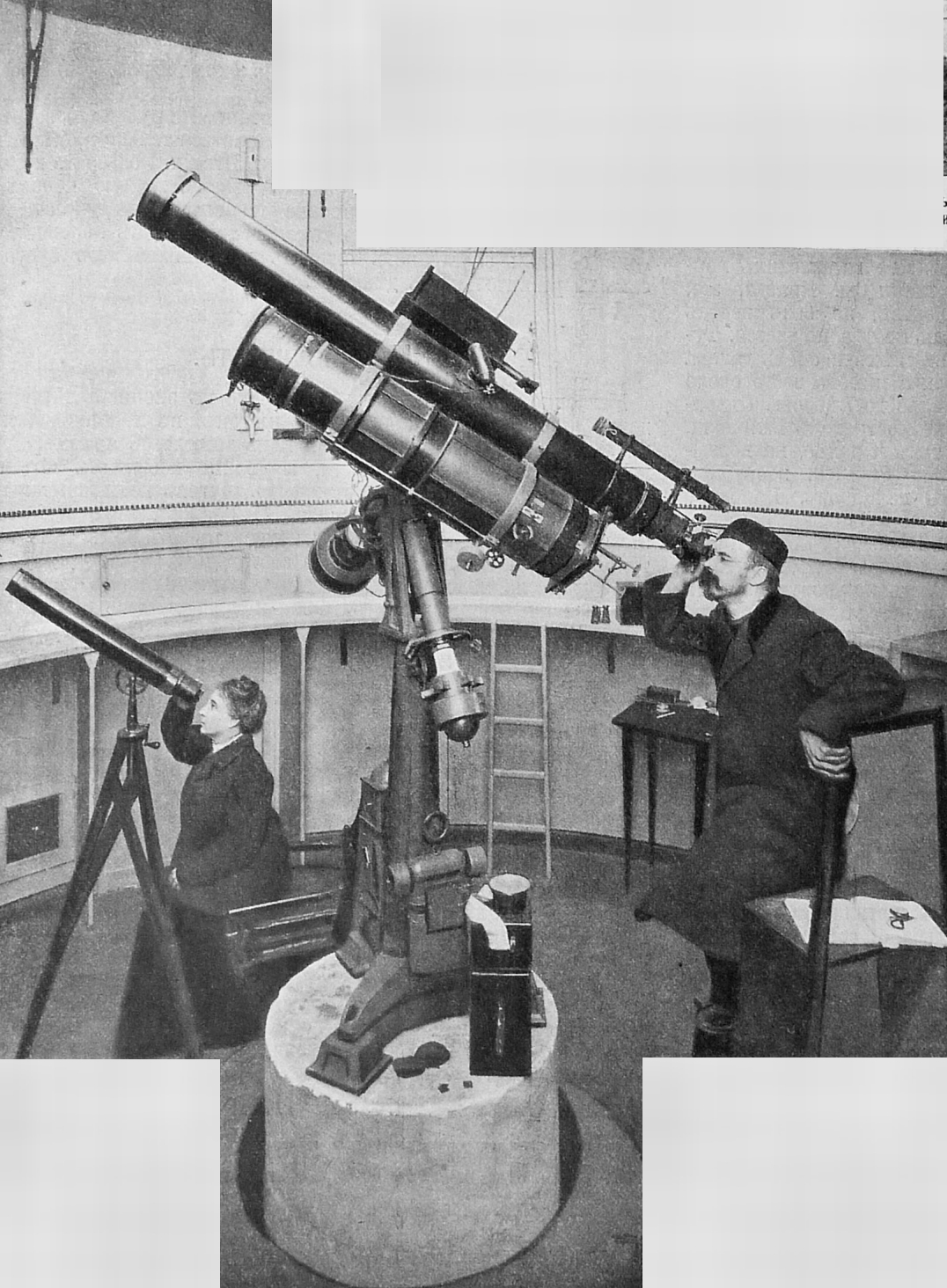 Гавриил Адрианович Тихов с женой в башне 6-дюймового Бредихинского астографа в Пулкове